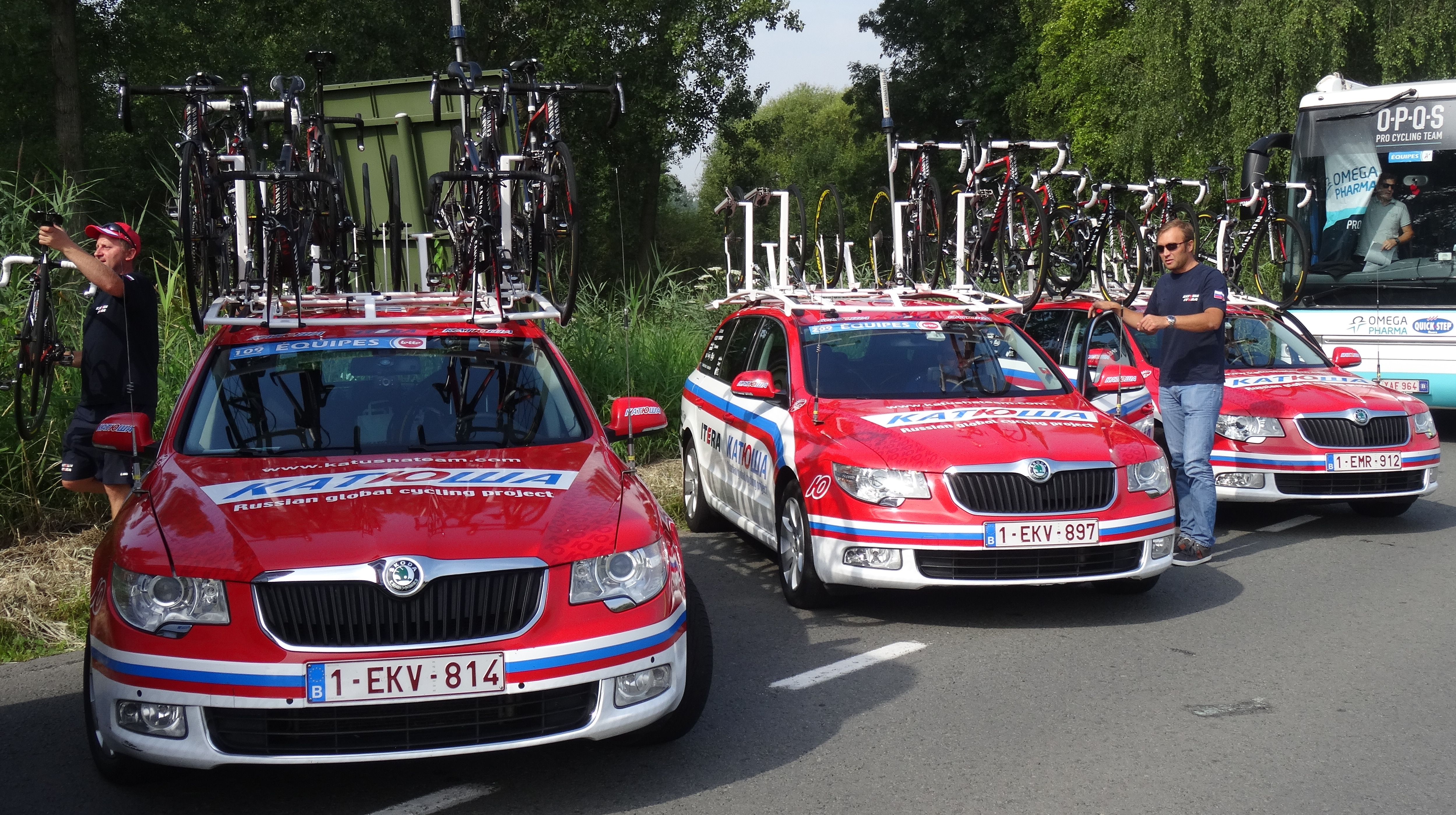 Reportage photographique réalisé le dimanche 27 juillet à l'occasion du départ de la deuxième étape du Tour de Wallonie 2014 à Péronnes-lez-Antoing (Antoing), Belgique.